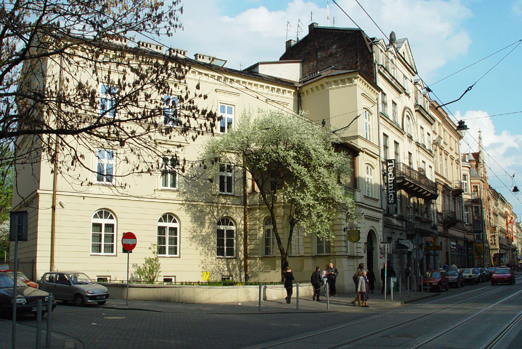 Budynek Instytutu Neofilologii i Instytutu Sztuki Uniwersytetu Pedagogicznego im. KEN przy ul. Karmelickiej 41 Kraków, zbudowany w 1871 roku